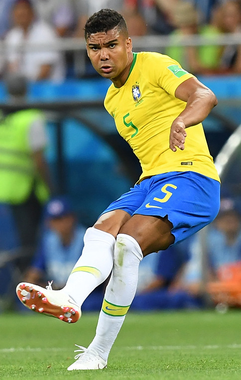 Желто-зеленая торсида на берегах Дона. Неймар и Бразилия пожаловали в Ростов!